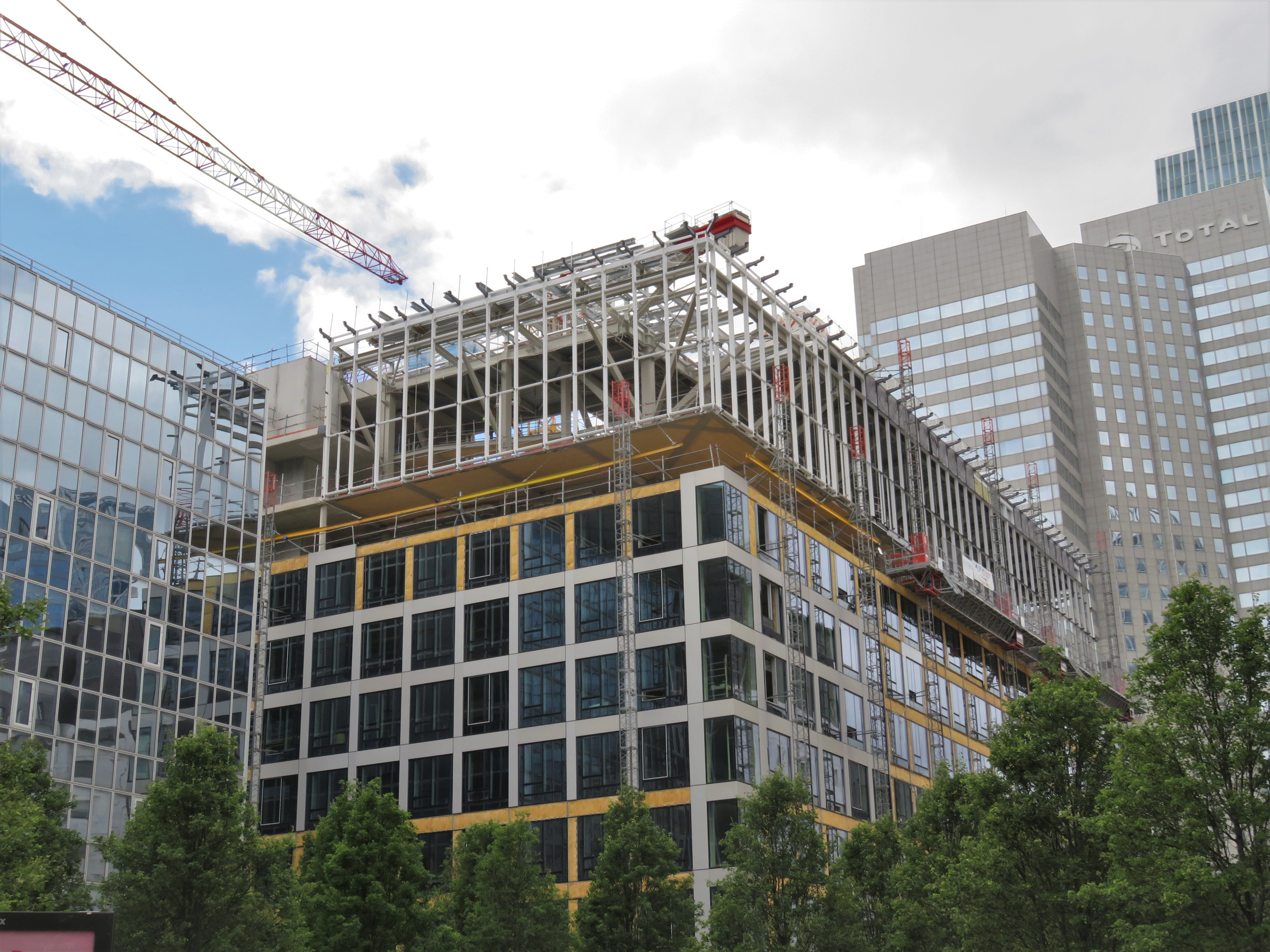 Carré Michelet